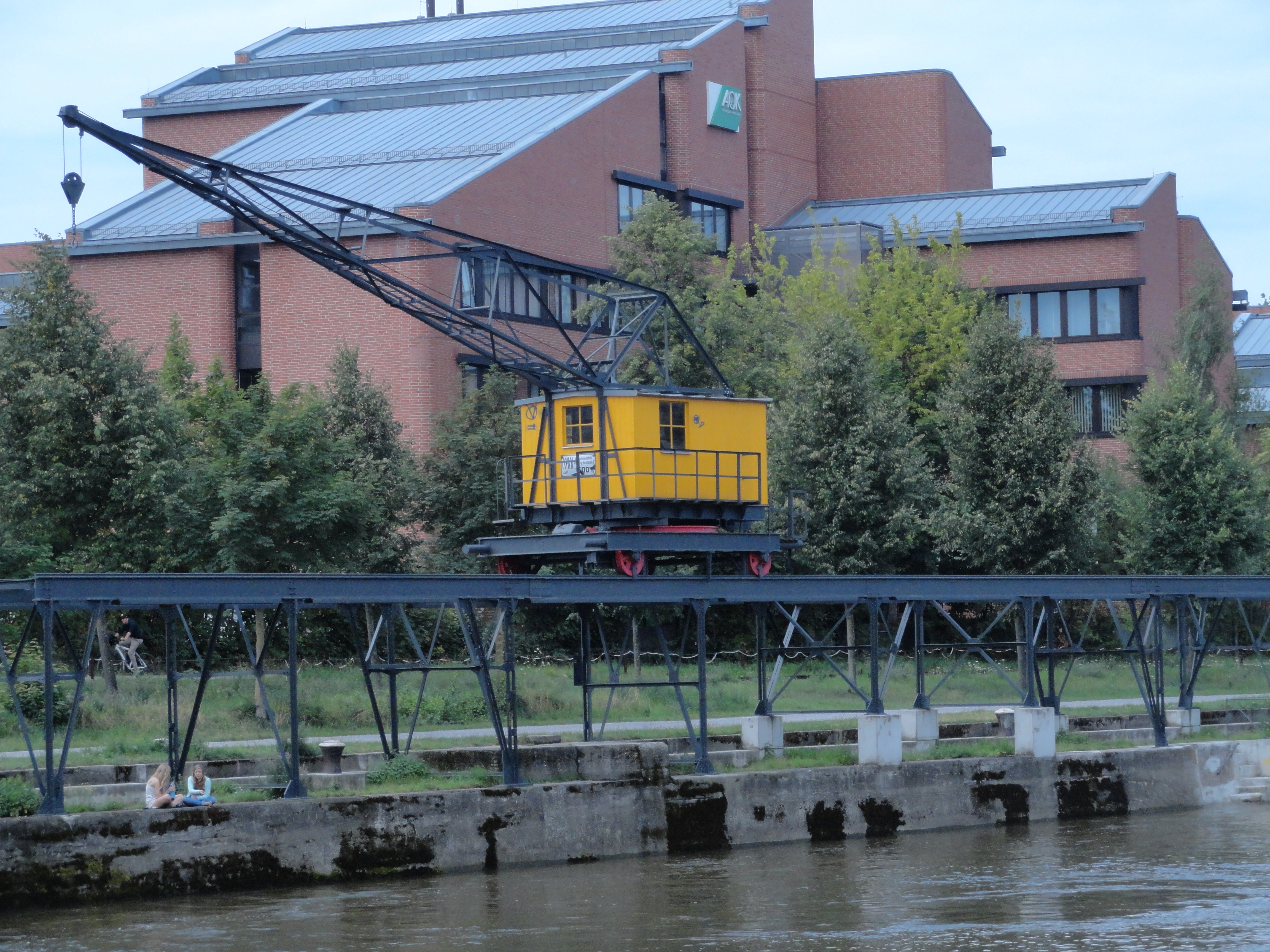 Historischer Hafenkran in Regensburg als Teil des Donau-Schiffahrts-Museums